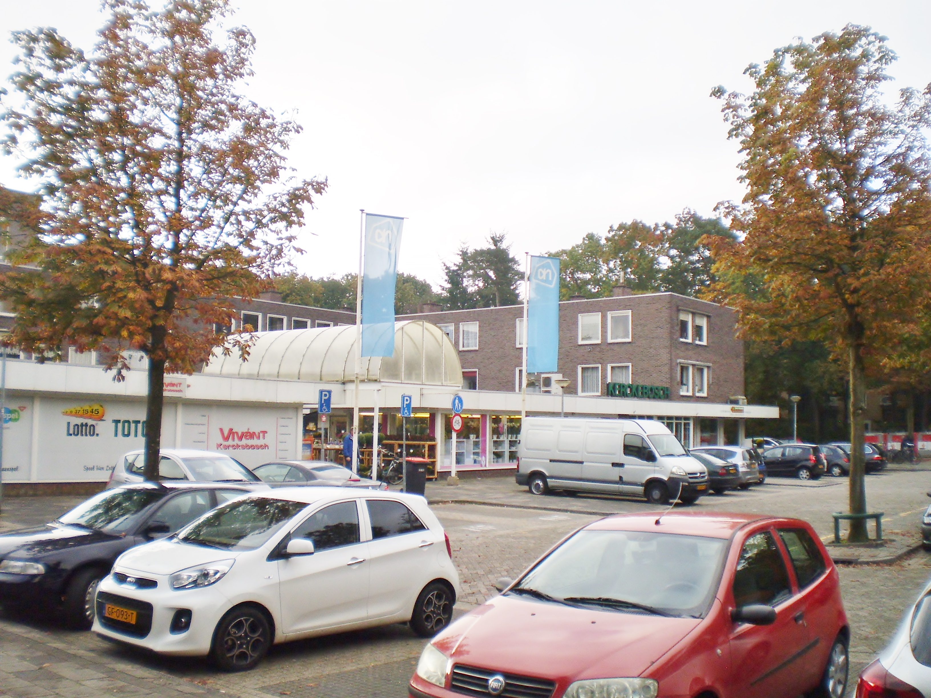 winkelcentrum Kerckebosch